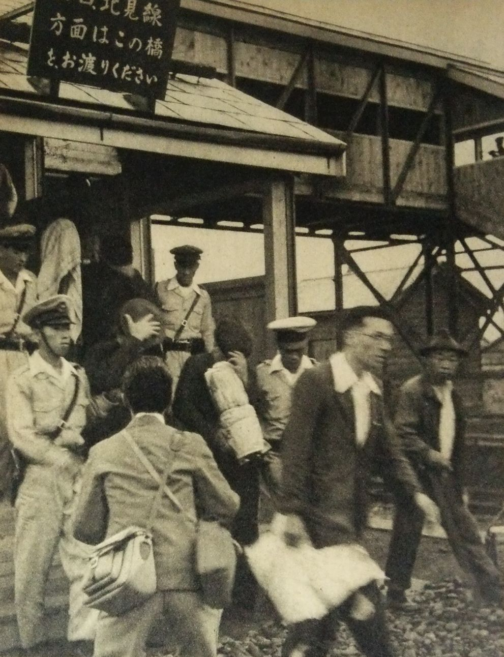 稚内署へ連行される、ラズエズノイ号乗組員ら